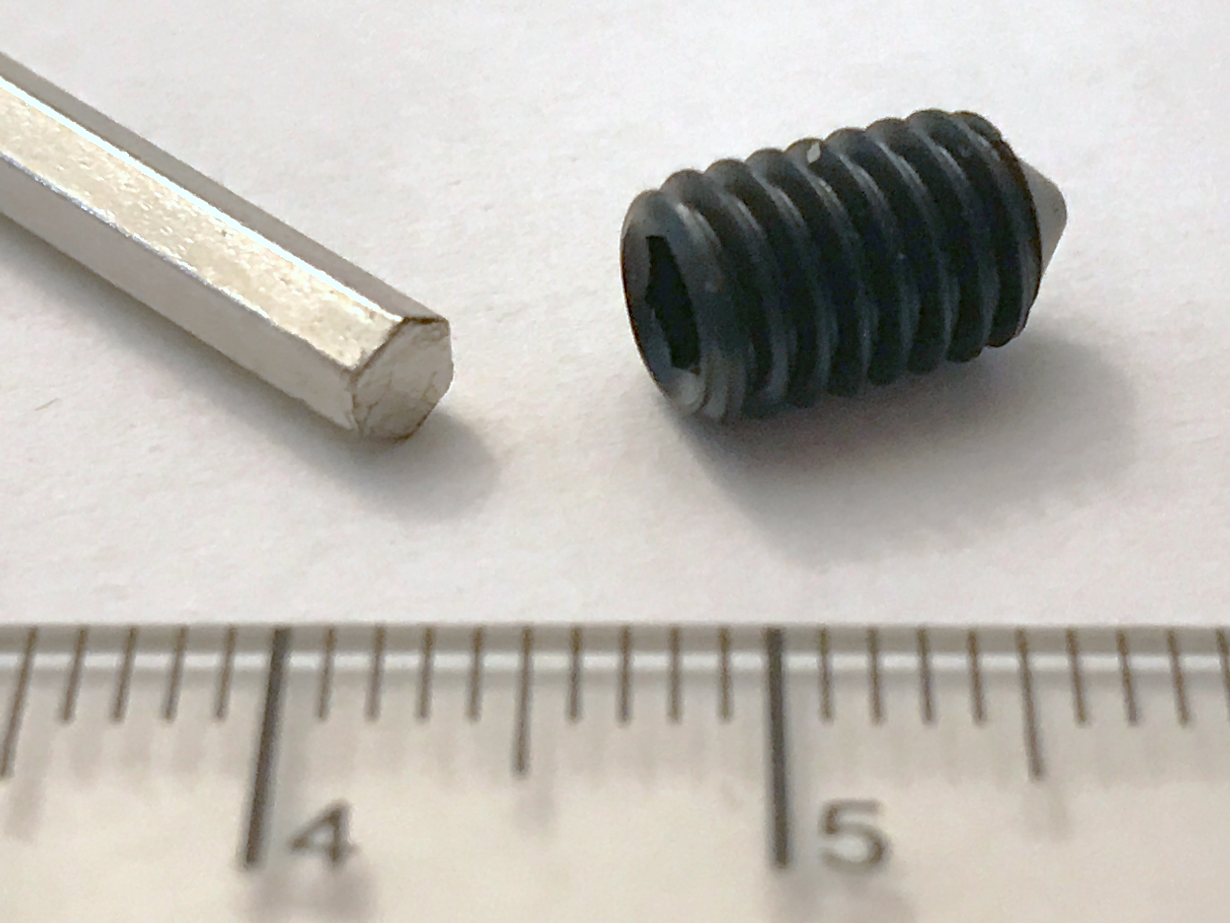 Madenschraube mit Inbusschlüssel